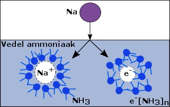 Metalli katioon ja solvateeritud elektron